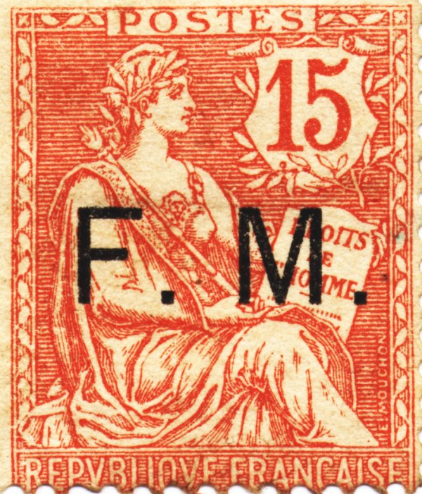 Type Mouchon retouché, surchargé FM (Franchise militaire).